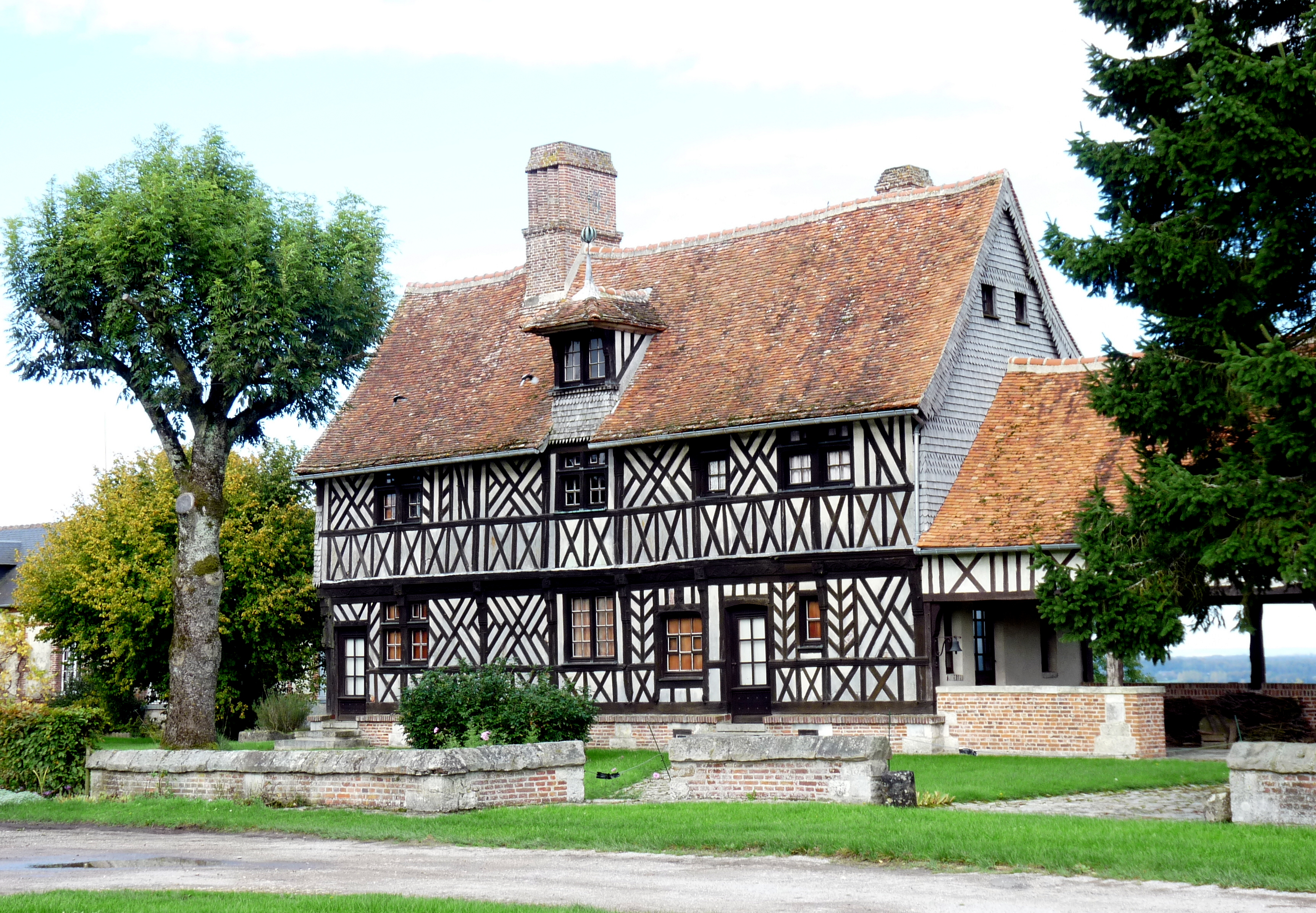 Maison de Henri IV .